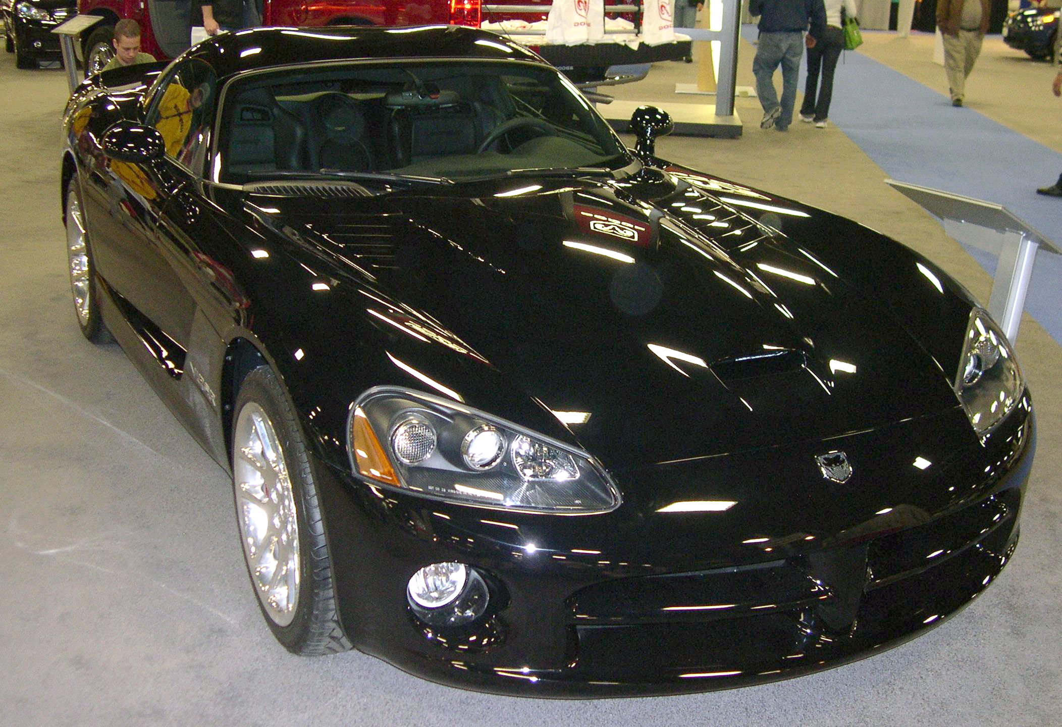 2006 Dodge Viper SRT-10